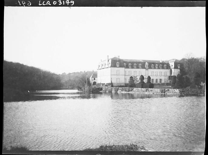 L’abbaye Saint-Maurice de Carnoët en 1893. Photographie de Paul Lancrenon.